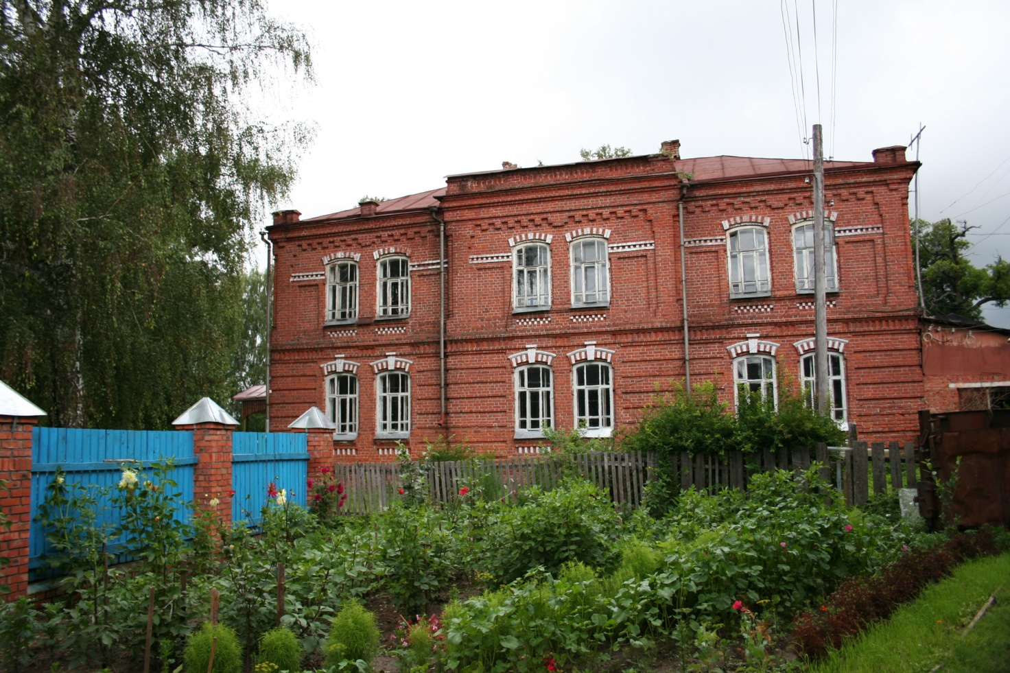 Кырык мары: Ӓвӓсирӹштӹш Шур школ. Ти школышты 1920-шы ивлан Кырык Мары Педтехникум ӹштен, кыды тӹнӓмшӹ жепӓш кырык мыры интеллигенцин ӓпшӓткудыжы ылын. Ти школышты Никон Игнатьев тыменьӹн.